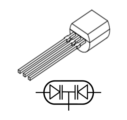 Outline-Darstellung und Schaltbild einer gegenpolig geschaltenen Varicap-Diode